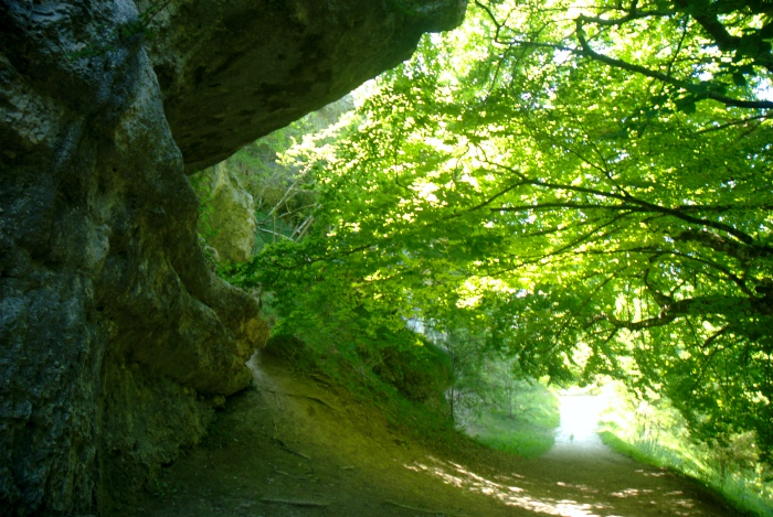 Okinako haitzartea Sasetarako bidean (Araba)